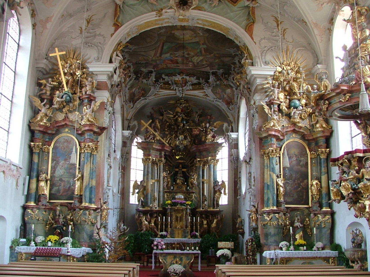 Oberostendorf